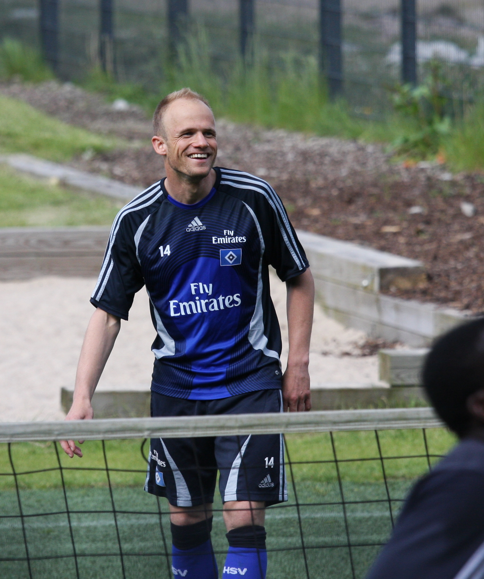 David Jarolim beim Fußballtennis